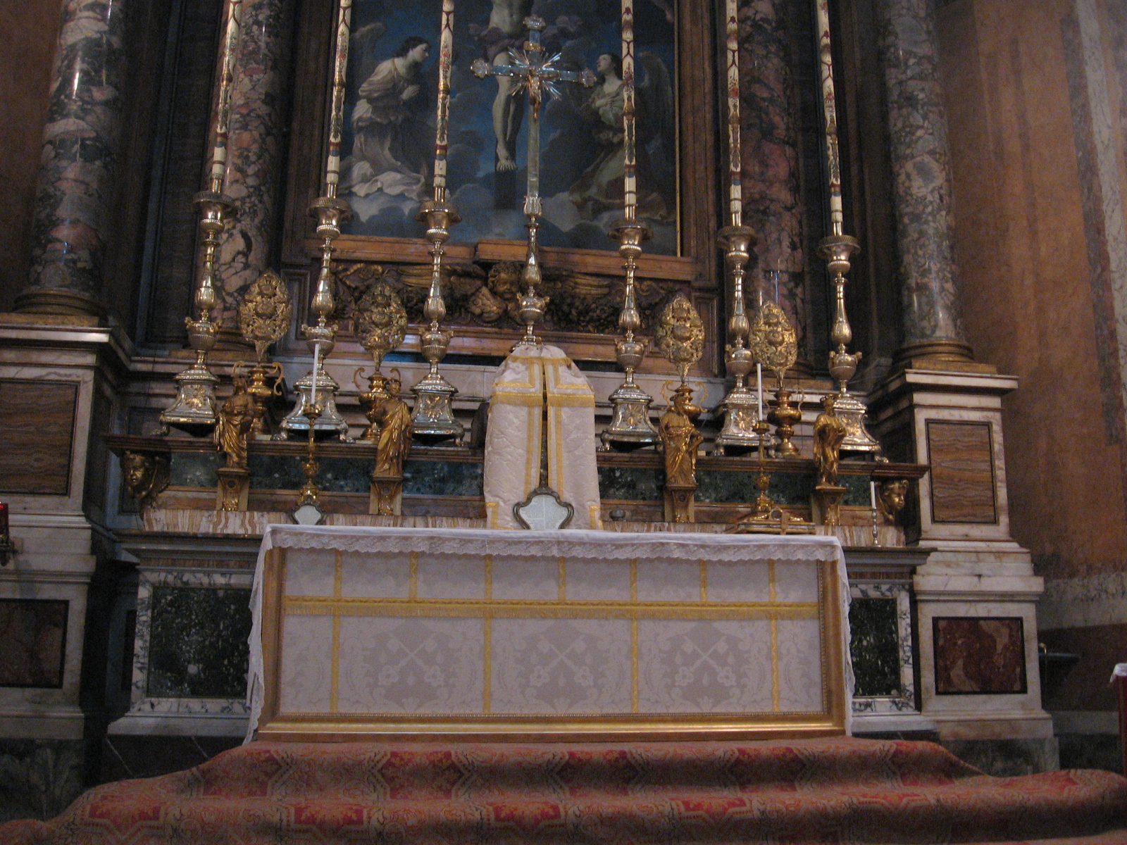 Church of Santisima Trinità dei Pellegrini in Rome - Altar